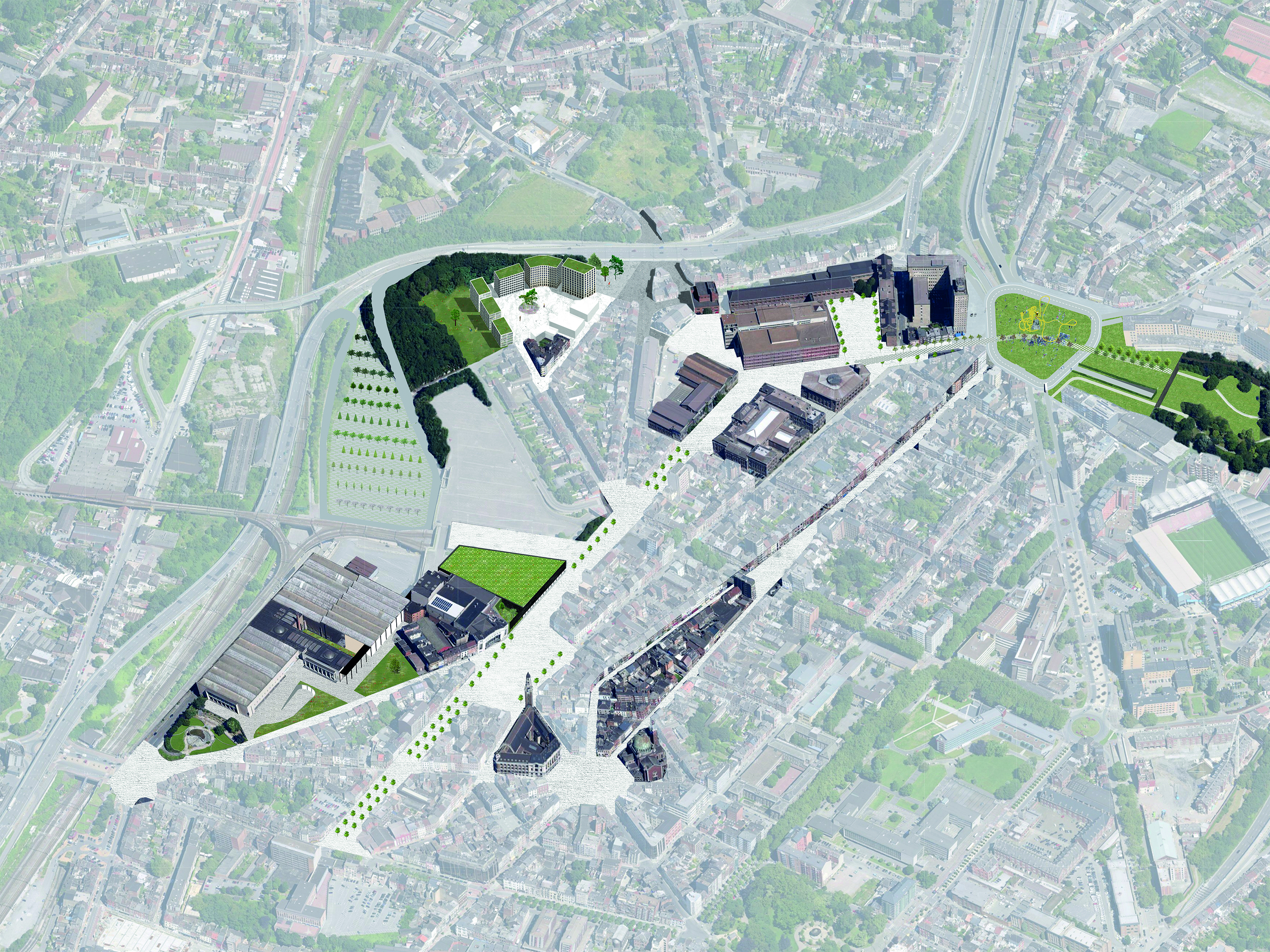 Carte du projet Charleroi DC - District Créatif